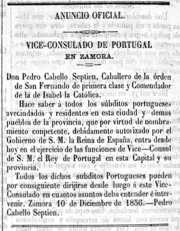 Pedro Cabello Septien, nombramiento de Viceconsul en 1856